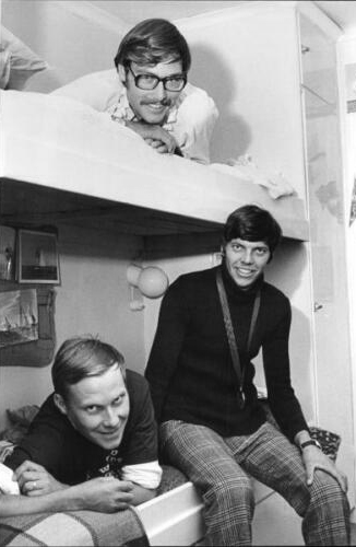 The brothers, Peter Sundelin, Jorgen Sundelin and Ulf Sundelin